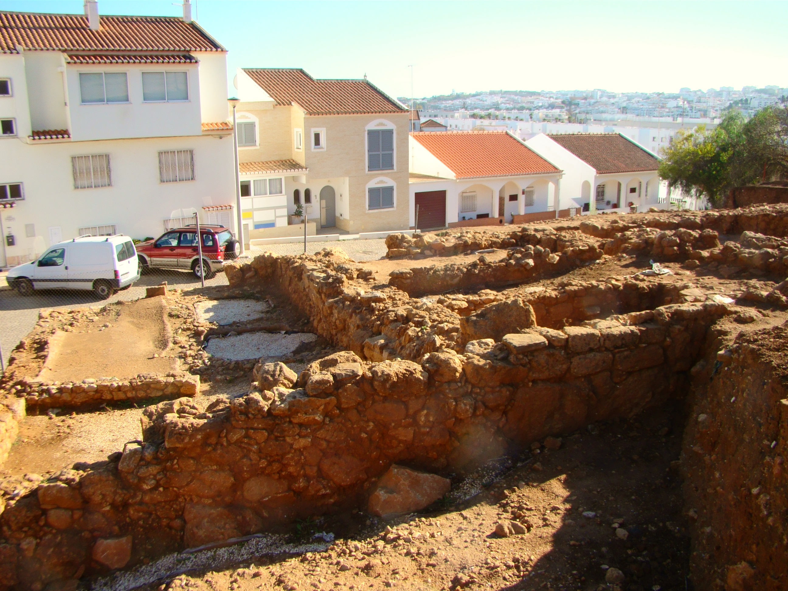 Monte Molião - Compartimento 5 III - 08.11.2017